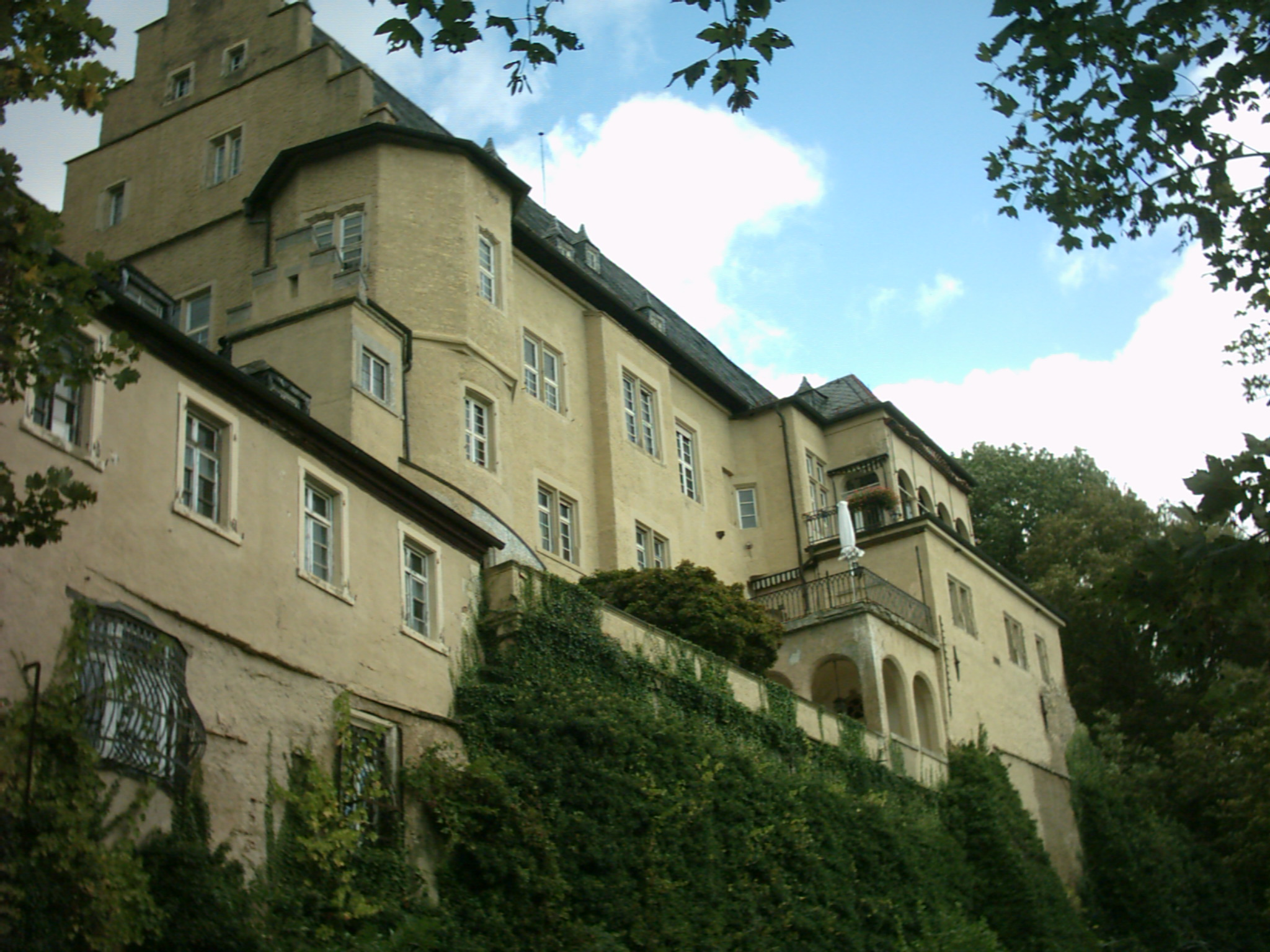 Schloss Mainberg in Schonungen (Ortsteil Mainberg), 3 km von Schweinfurth, Geburtsort von Gunter Sachs (1932-2011)